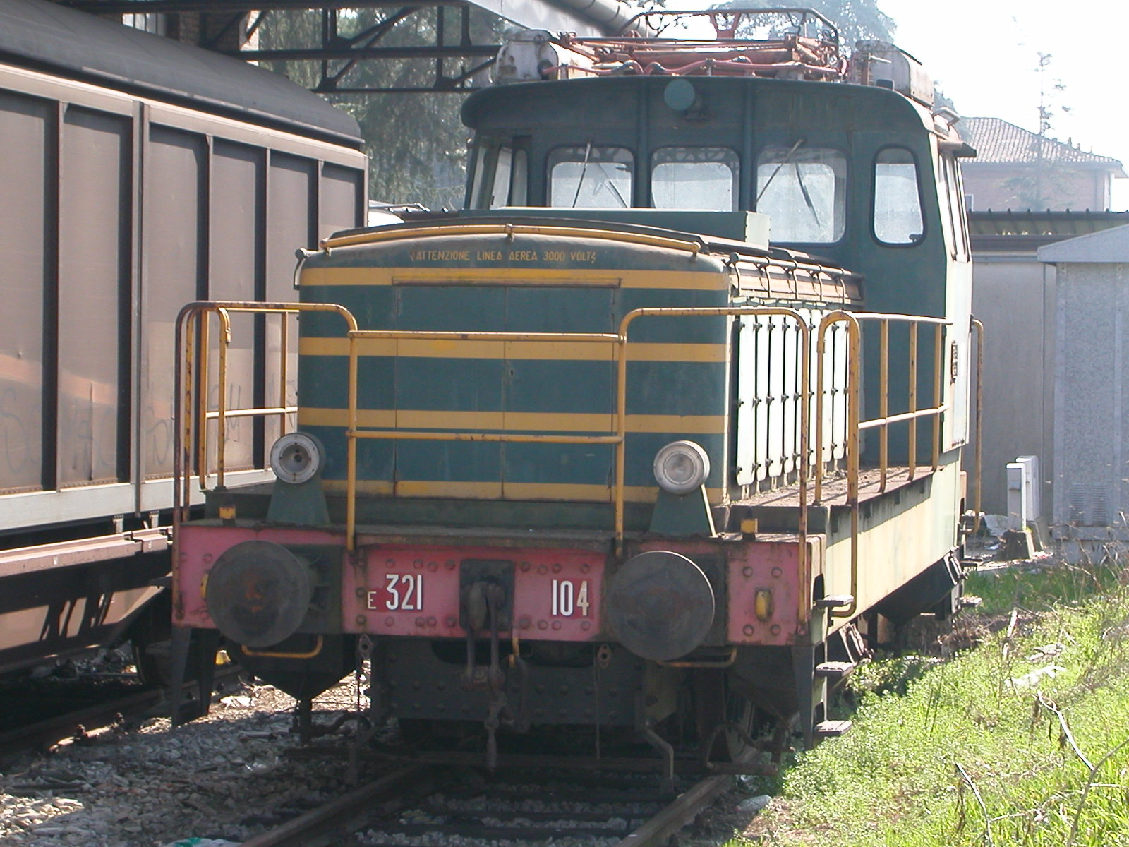 Locomotiva elettrica da manovra FS E.321.104; vista di tre quarti anteriore. Ferma in deposito presso la stazione di Rovigo.